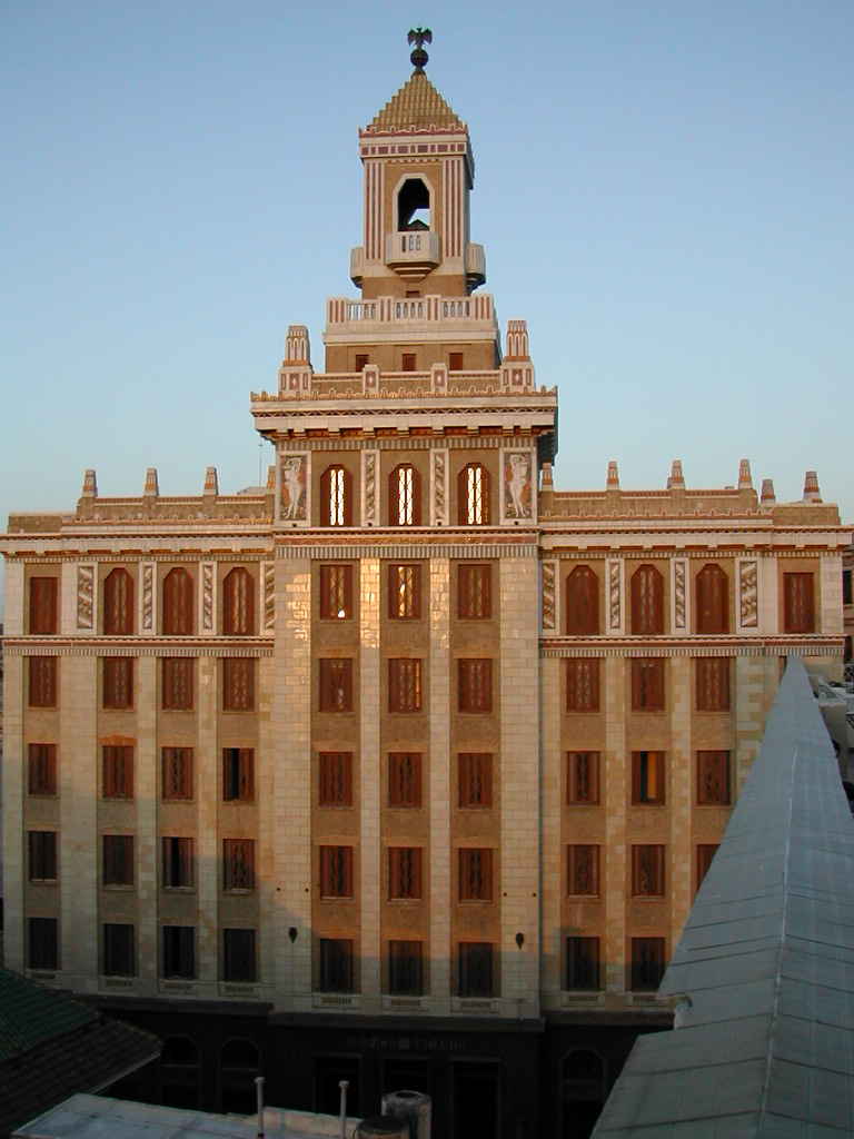 Bacardi Building